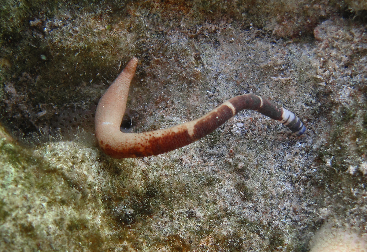 Phascolosoma agassizii à la Réunion.